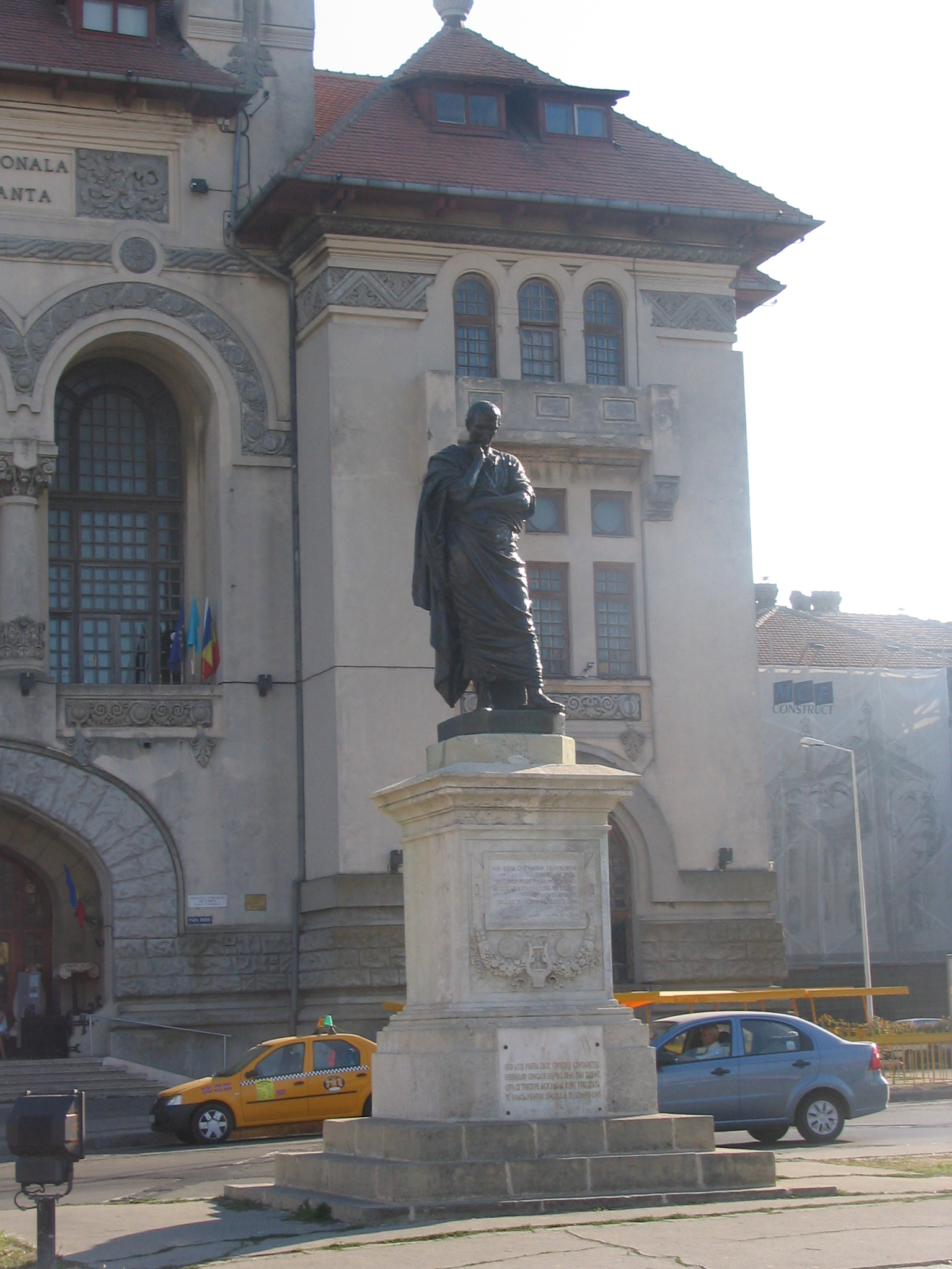 Statuia lui Ovdiu, Piata Ovidiu, Constanta